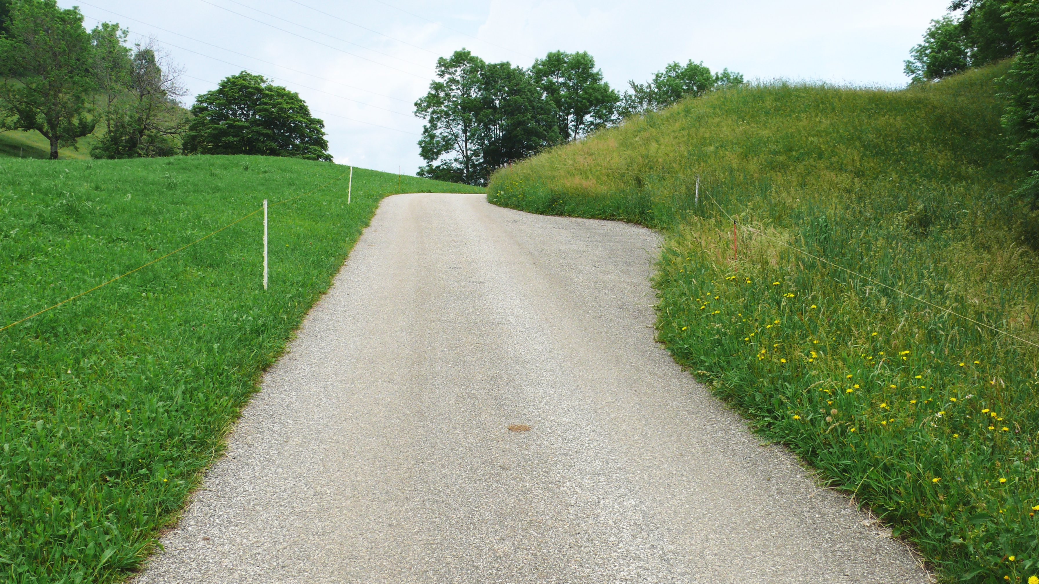 Ausweichstelle, passing place